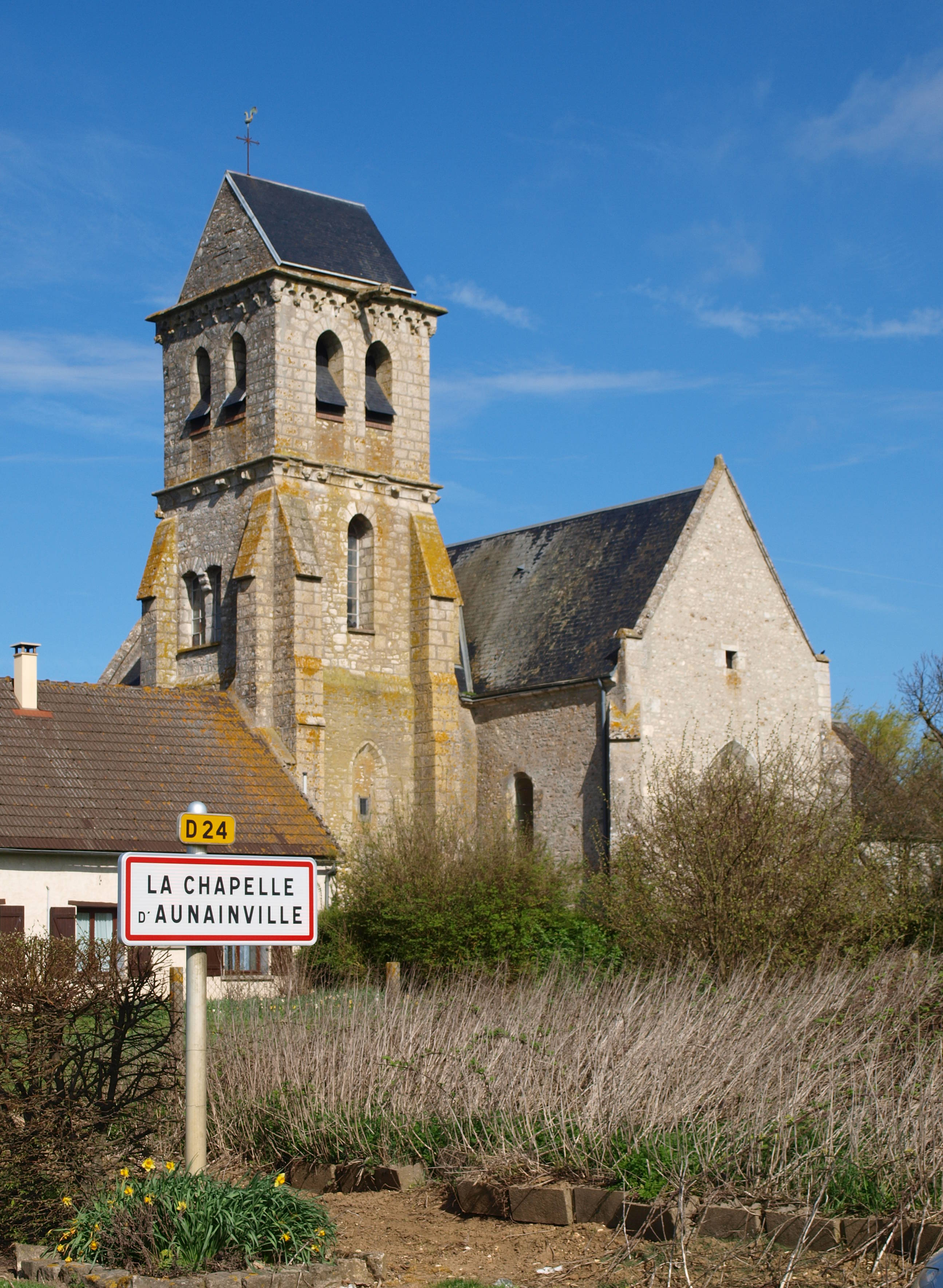 La Chapelle-d'Aunainville (Eure-et-Loir, France)